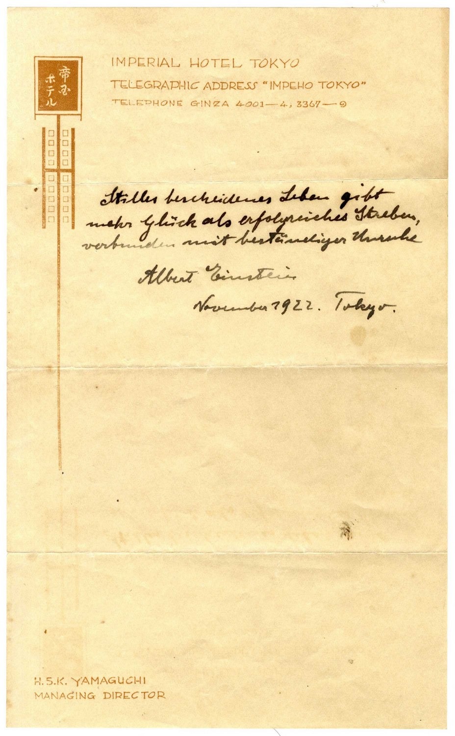 "נוסחת האושר" של אלברט אינשטיין